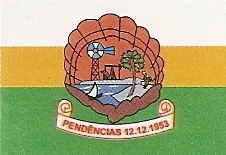 Bandeira de Pendências, estado do Rio Grande do Norte, Brasil.